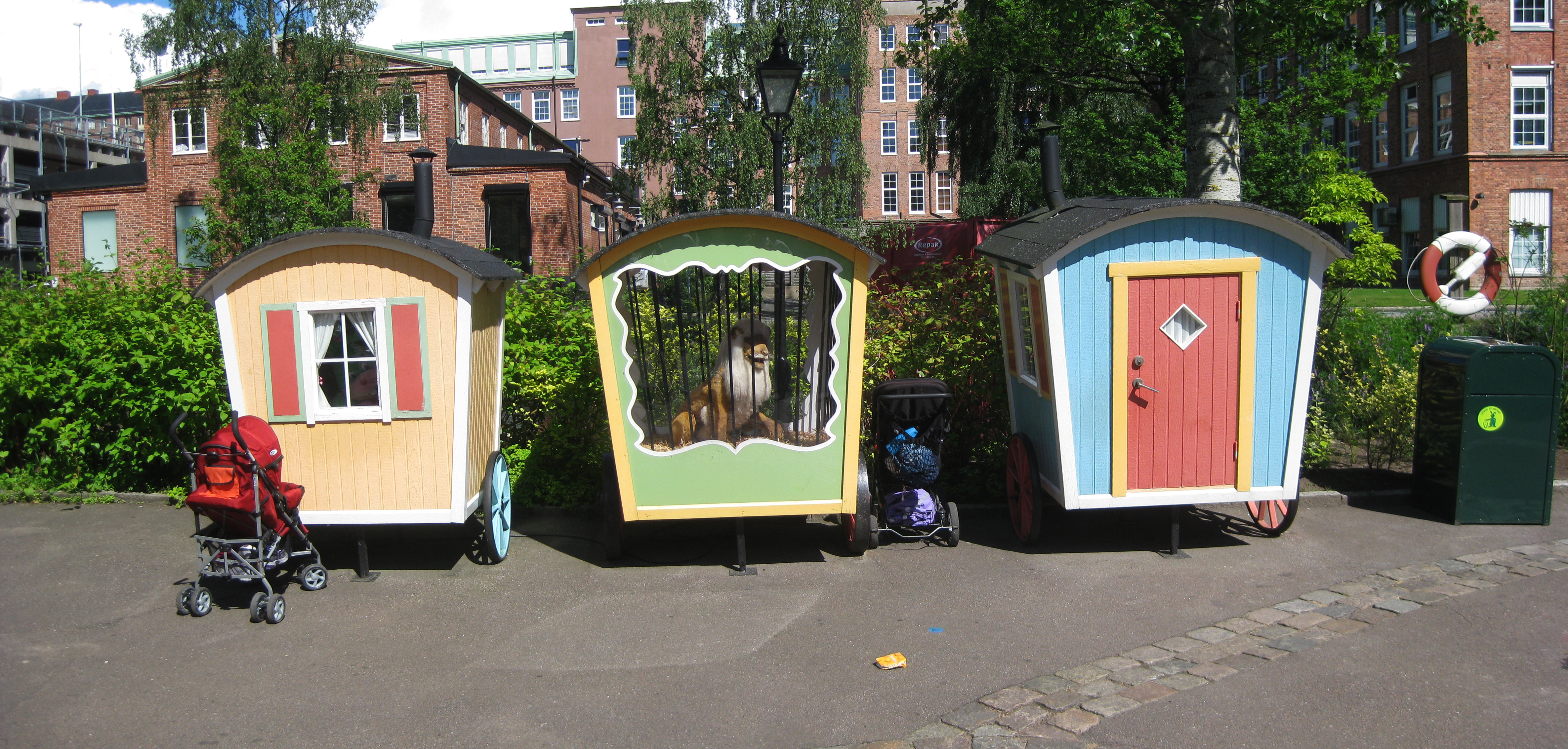 Dessa tre vagnar stod tidigare utanför Cirkusexpressen på Liseberg i Göteborg, men står nu nere vid vattnet nära Ponnykarusellen.